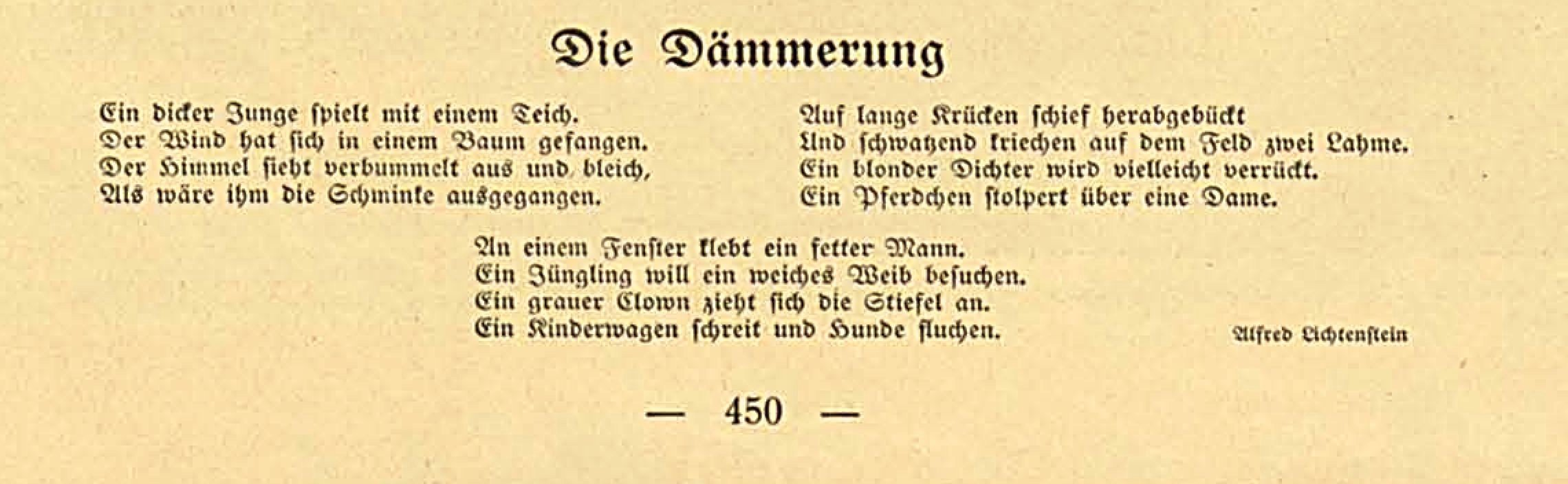 Die Dämmerung. Aus: Simplicissmus. Jg. 16, H. 27, S. 450